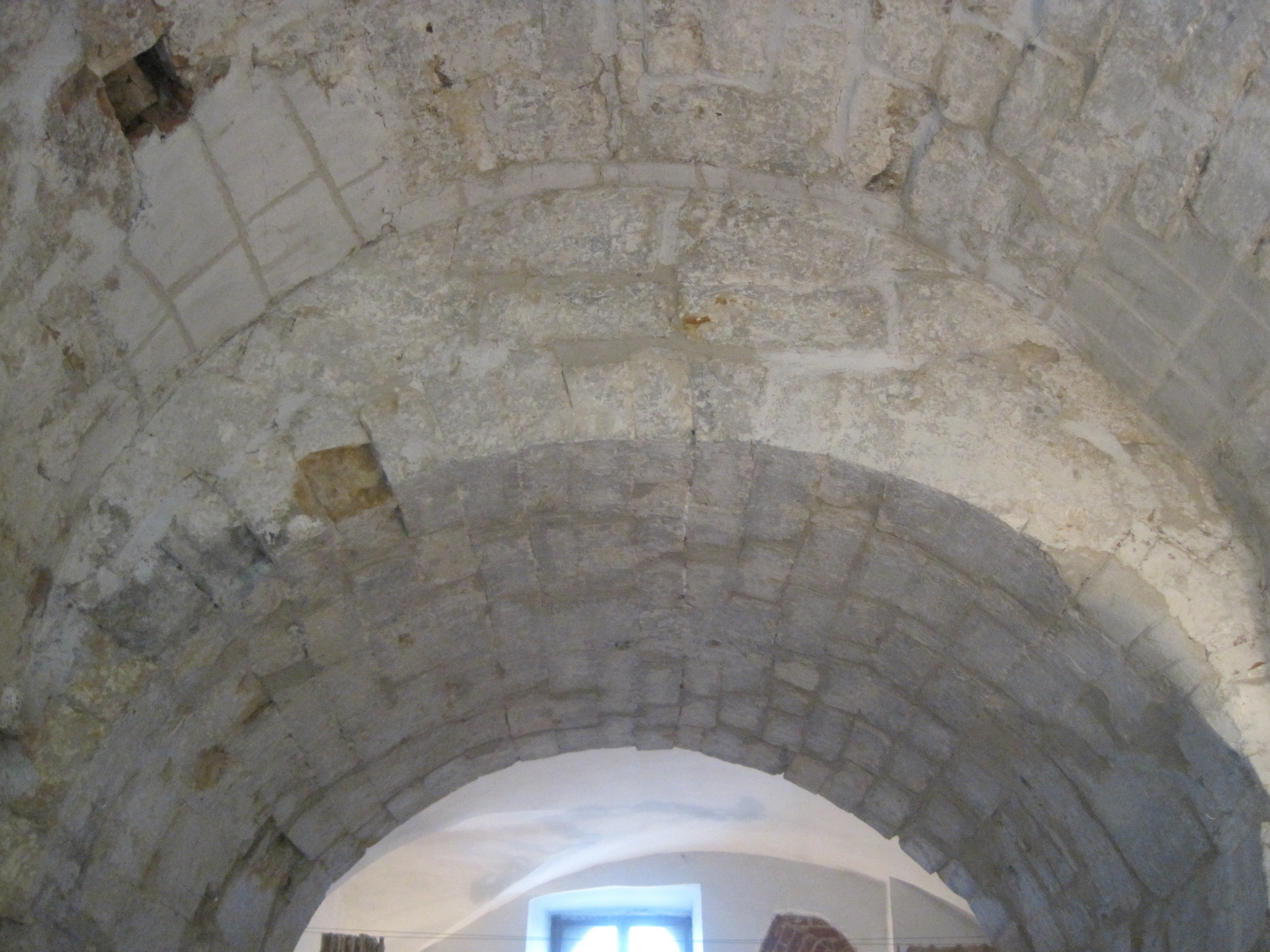 Кремлевские ворота